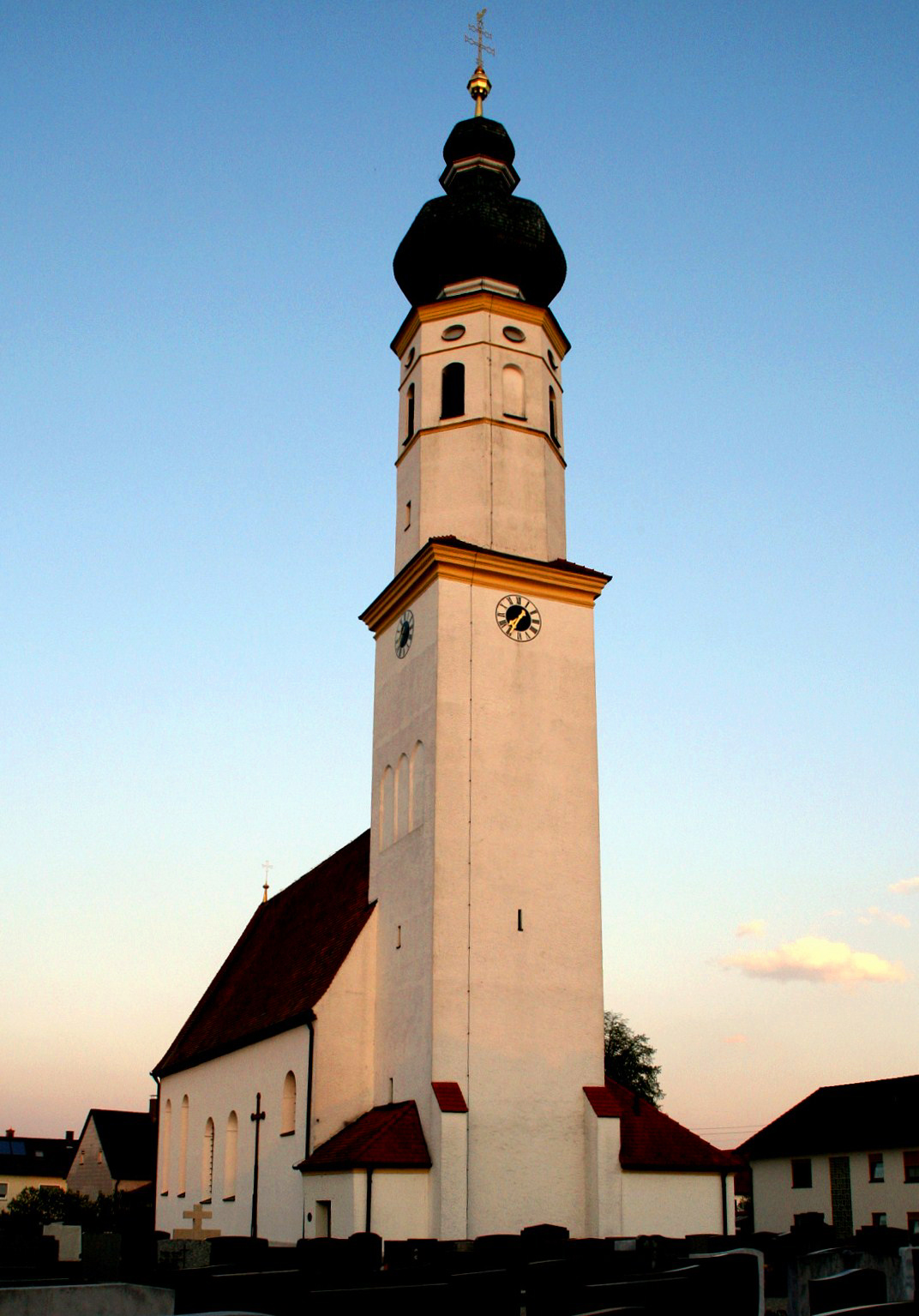 Die katholische Kirche Mariae Himmelfahrt in Mößling (Stadt Mühldorf am Inn, Landkreis Mühldorf am Inn, Oberbayern). Die Kirche mit weithin sichtbarem Kirchturm wurde im 15. Jahrhundert im gotischen Stil erbaut. 1751 erfolgte eine tiefgreifende barocke Umgestaltung, die auch den Turm erhöhte.